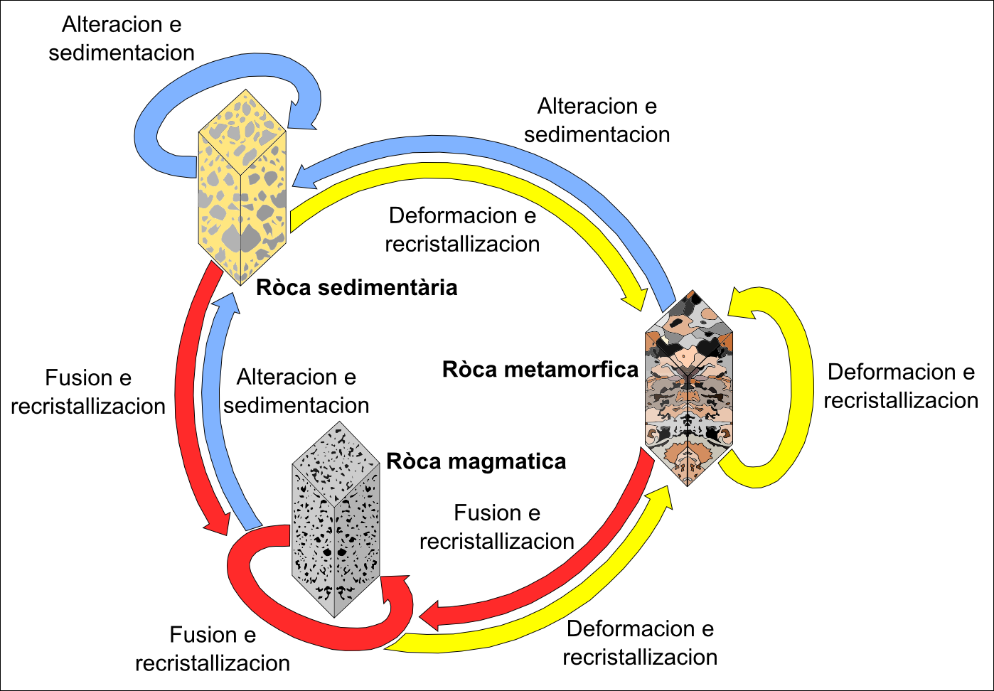 Cicle dei ròcas.